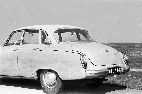 Wartburg 311 od tyłu; polska tablica rejestracyjna (wzór z okresu 1956-1976) XW 87-11 oznaczała: pierwsza litera X - stare województwo wrocławskie (w przybliżeniu identyczne z obecnym dolnośląskim) druga litera W - miasto Wrocław (po wyczerpaniu się zasobów numerów z literami XW stosowano dla Wrocławia zestawy XX, potem XT i XS)